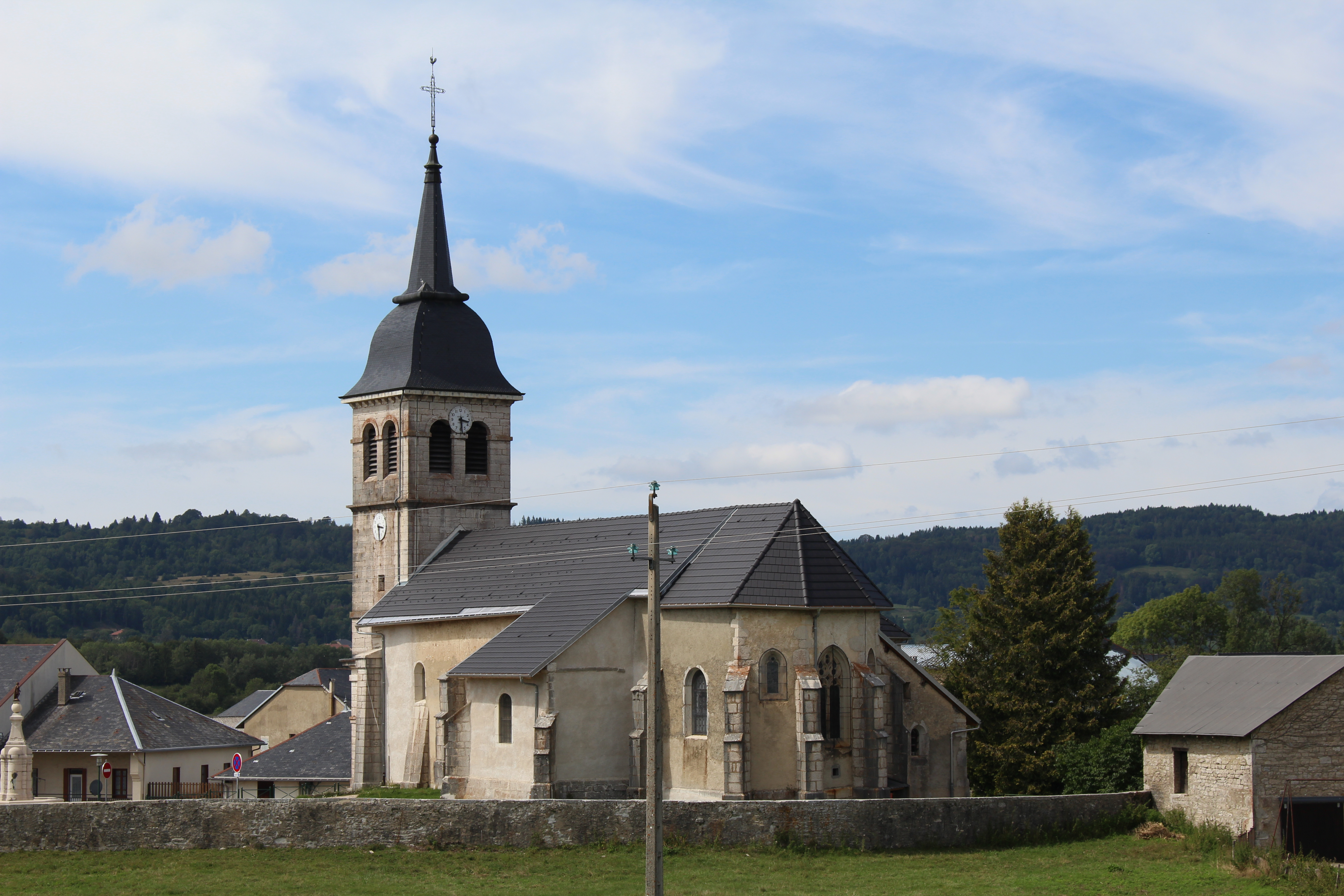 Église Saint-Victor-et-Saint-Ours de Champdor, Champdor-Corcelles.